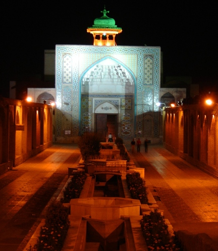 al-Nabi Mosque, Qazvin. Safavid period.